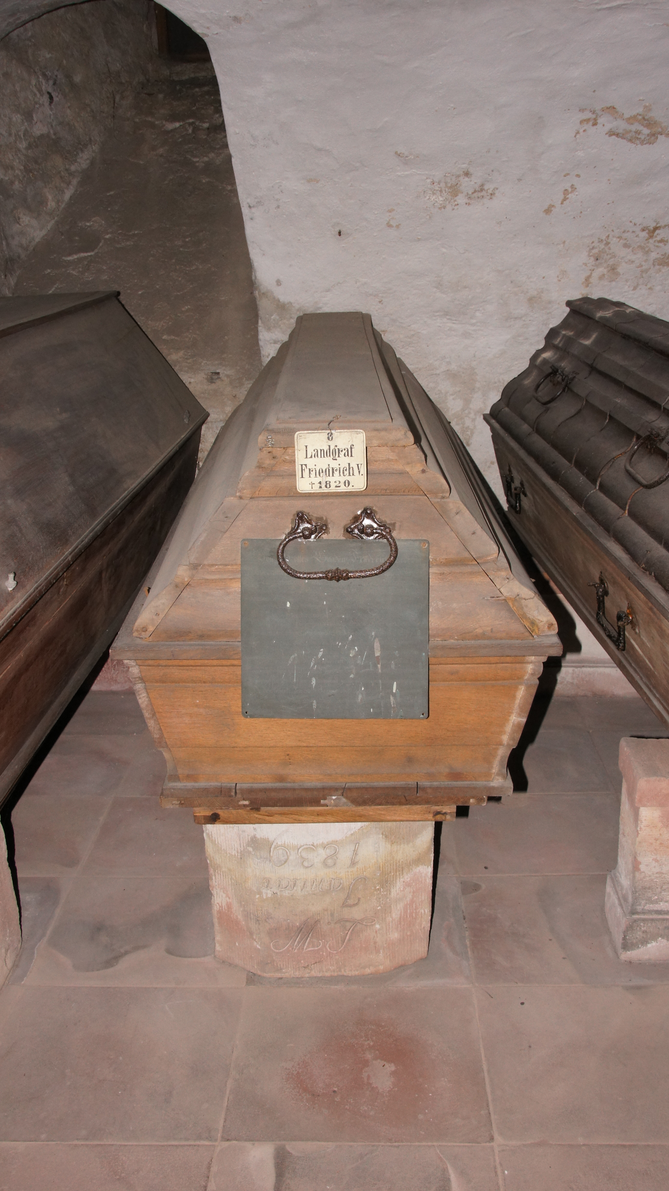 Bad Homburg vor der Höhe, Schloss, Gruft, Landgraf Friedrich V